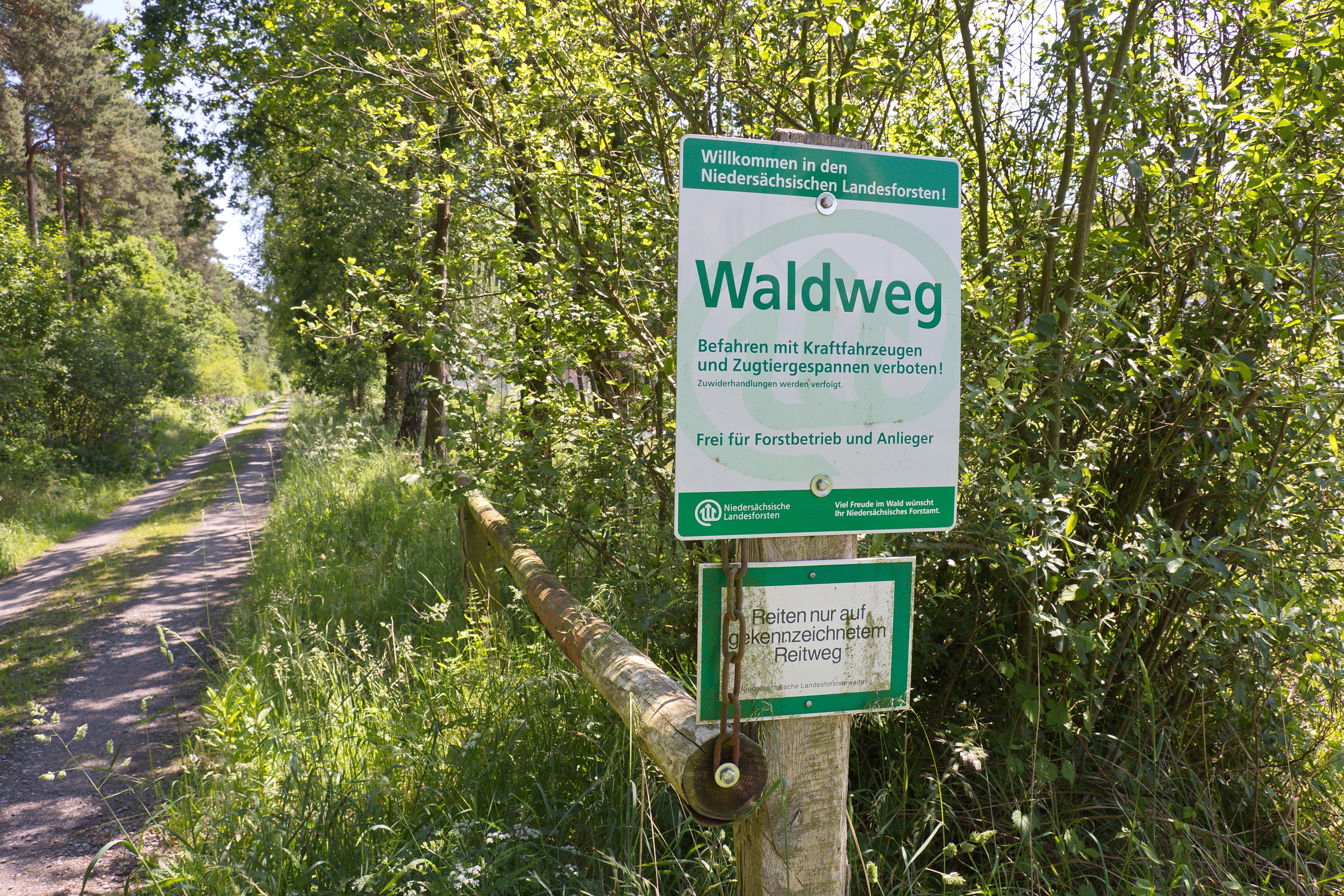 Naturschutzgebiet Brand, Niedersachsen, Deutschland